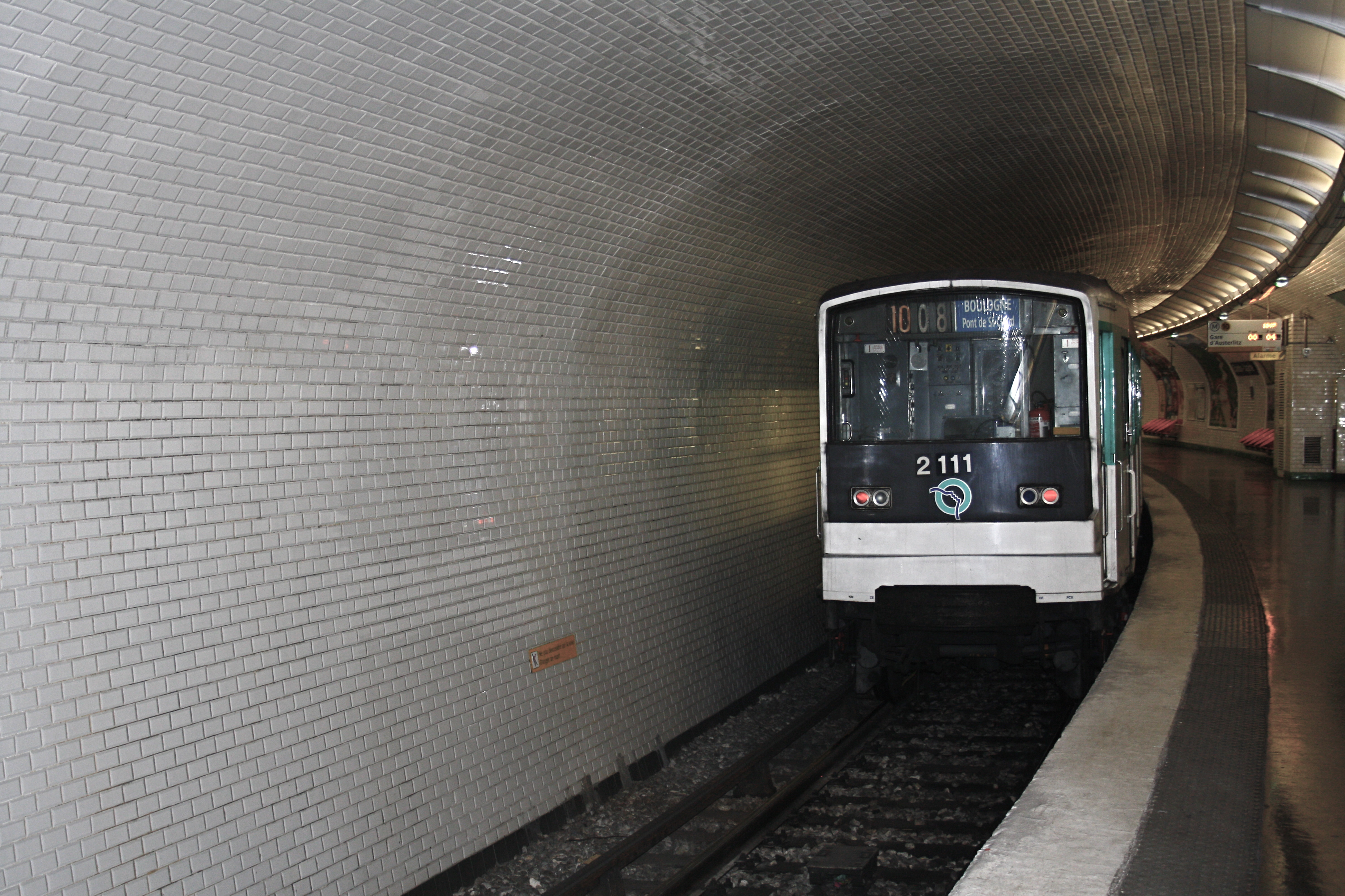 MF 67 in der Pariser Métrostation Chardon-Lagache